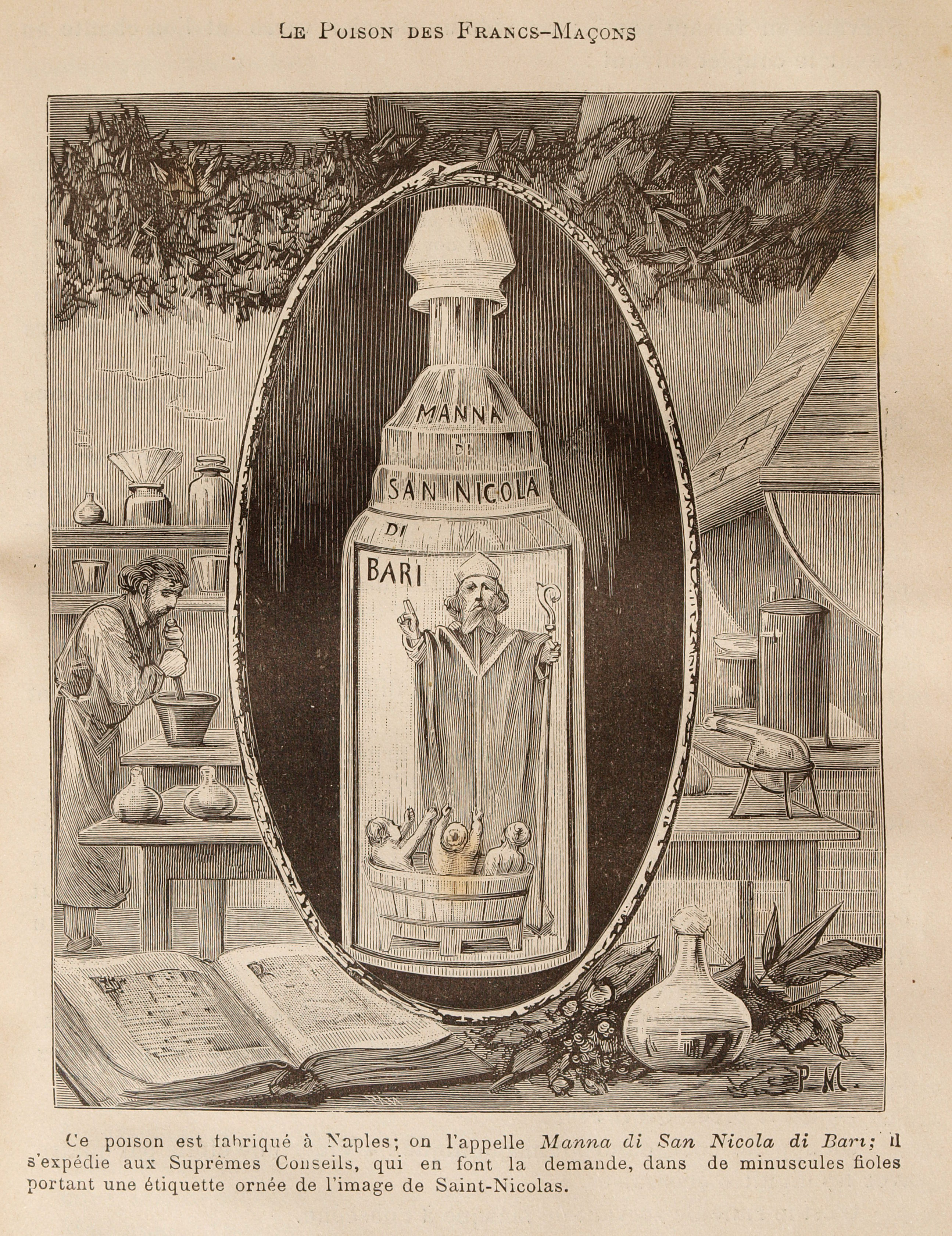 Une des gravures du document de Léo Taxil, Les Mystères de la Franc-Maçonnerie, Paris, 1886.